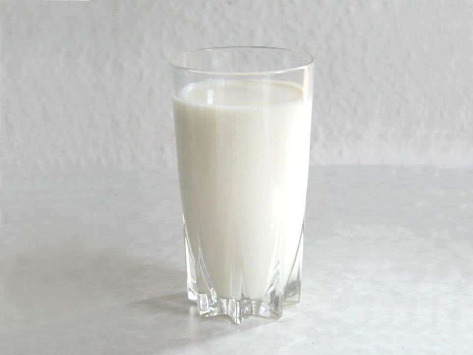 Szklanka mleka